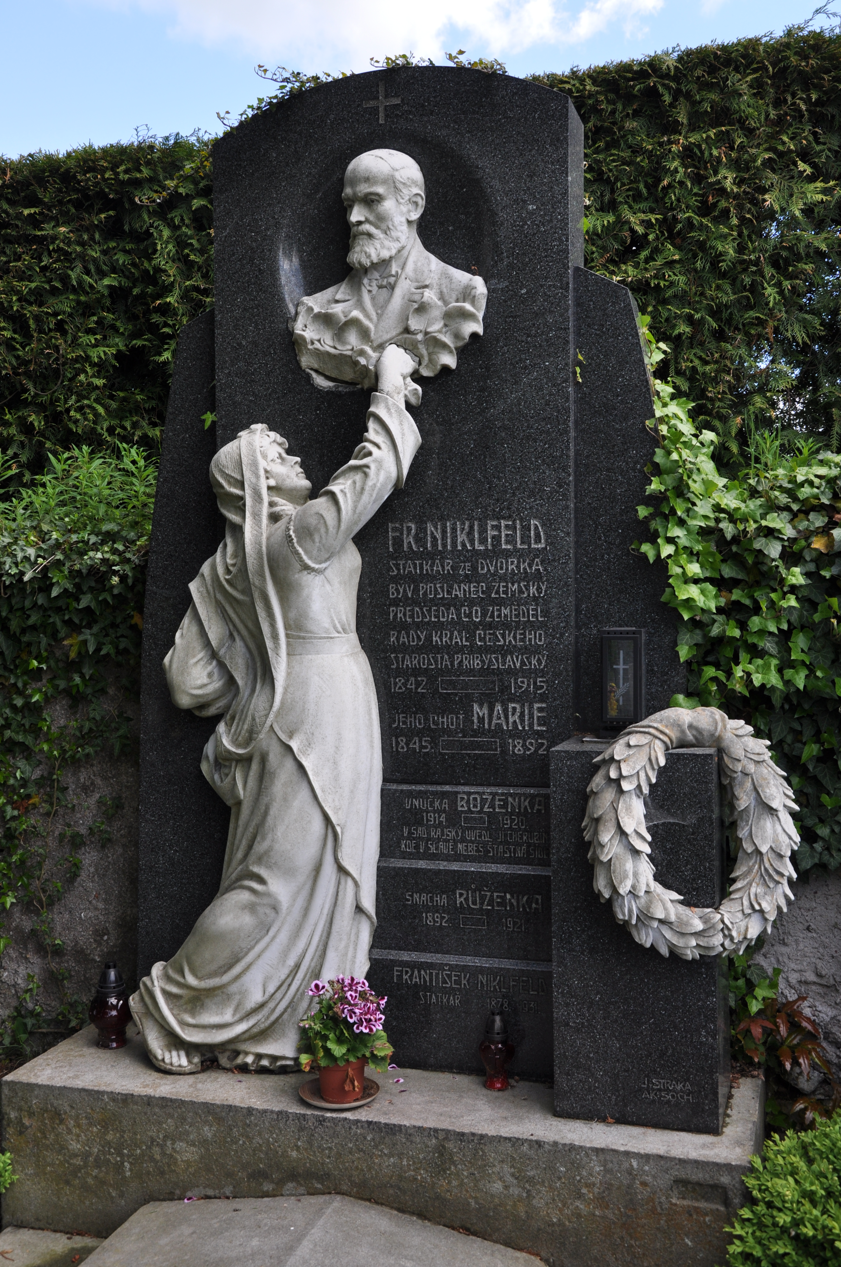 Náhrobek Františka Niklfelda, českého politika, poslance Českého zemského sněmu a starosty Přibyslavi. Hřbitov Havlíčkova ulice. Přibyslav. Okr. Havlíčkův Brod. Kraj Vysočina.